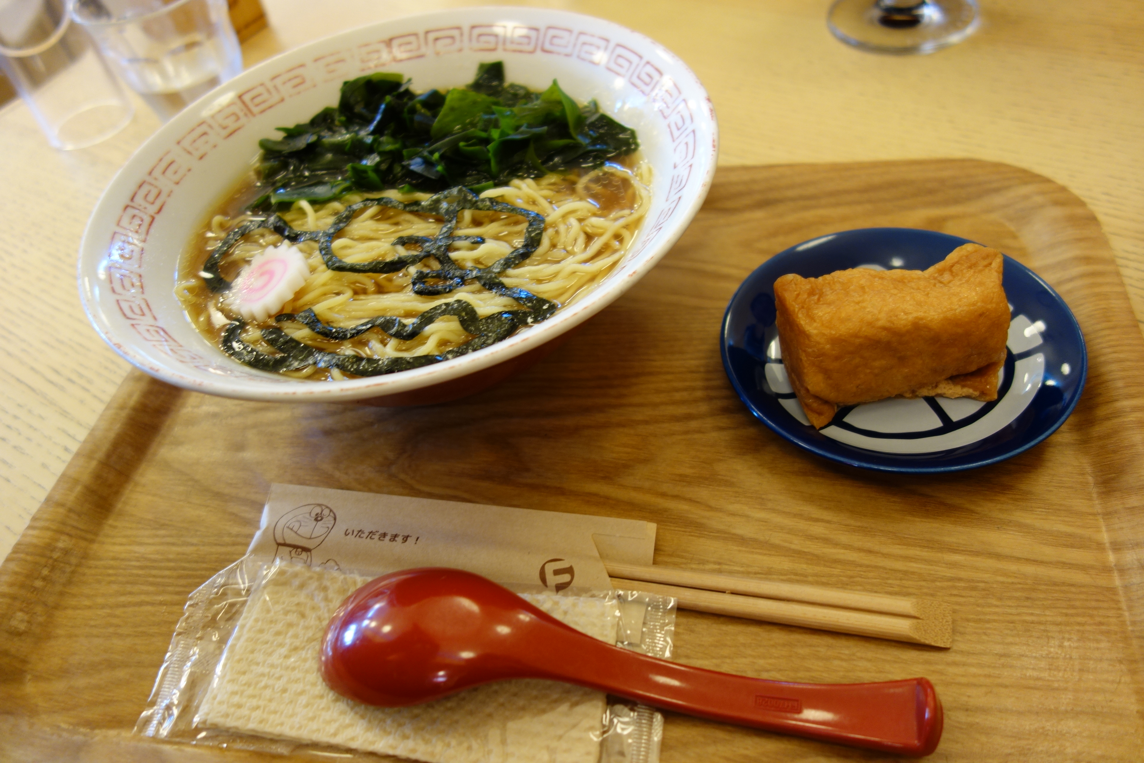 ラーメン大好き小池さん 900円 ミュージアムカフェ｜川崎市 藤子・F・不二雄ミュージアム